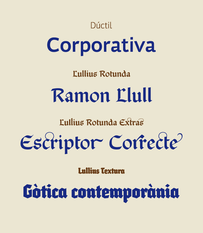 Mostra lletres tipogràfiques Dúctil, Lullius Rotunda, Lullius Rotunda Extras, Lullius Textura